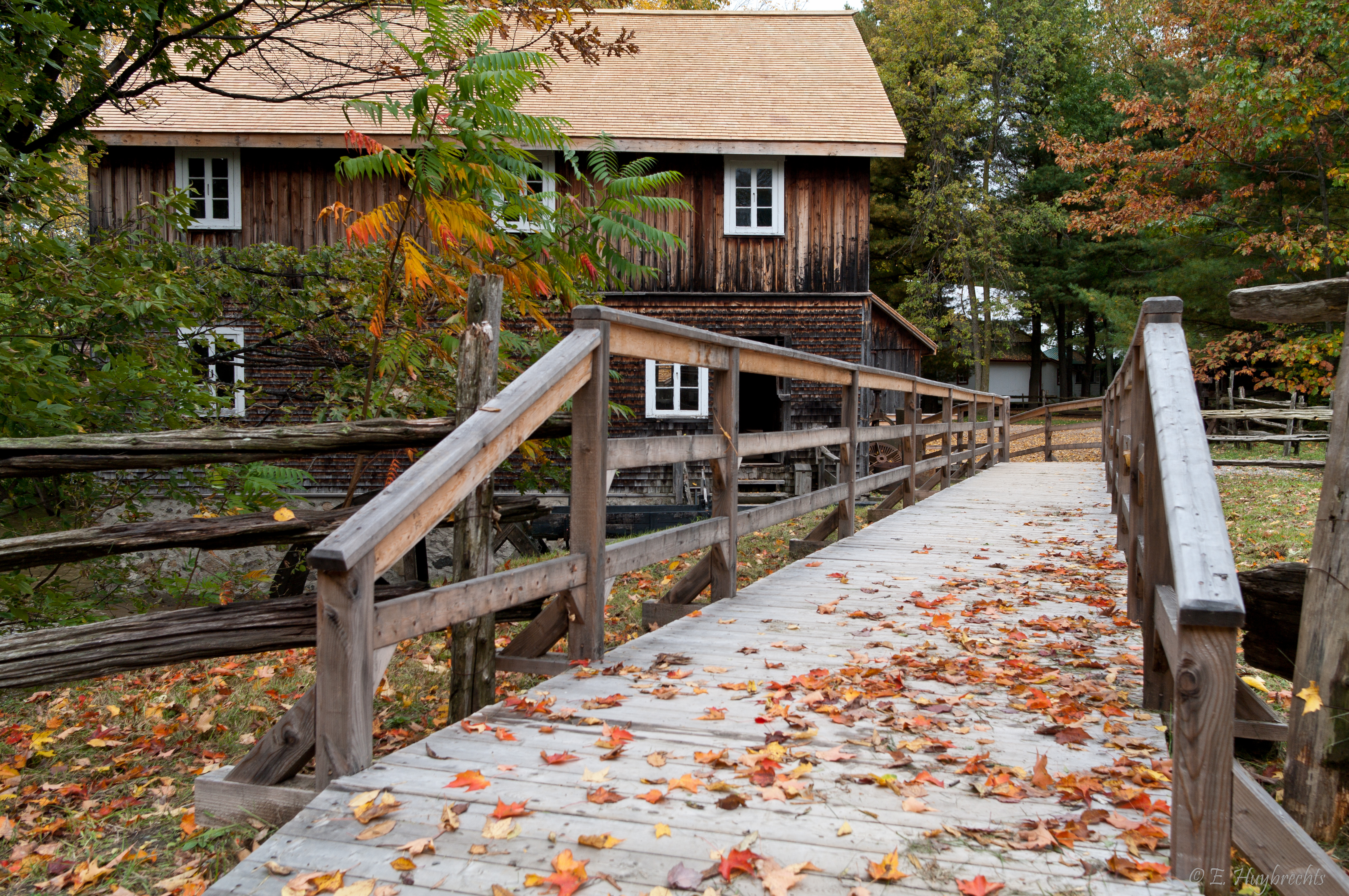 Vieux moulin en automne